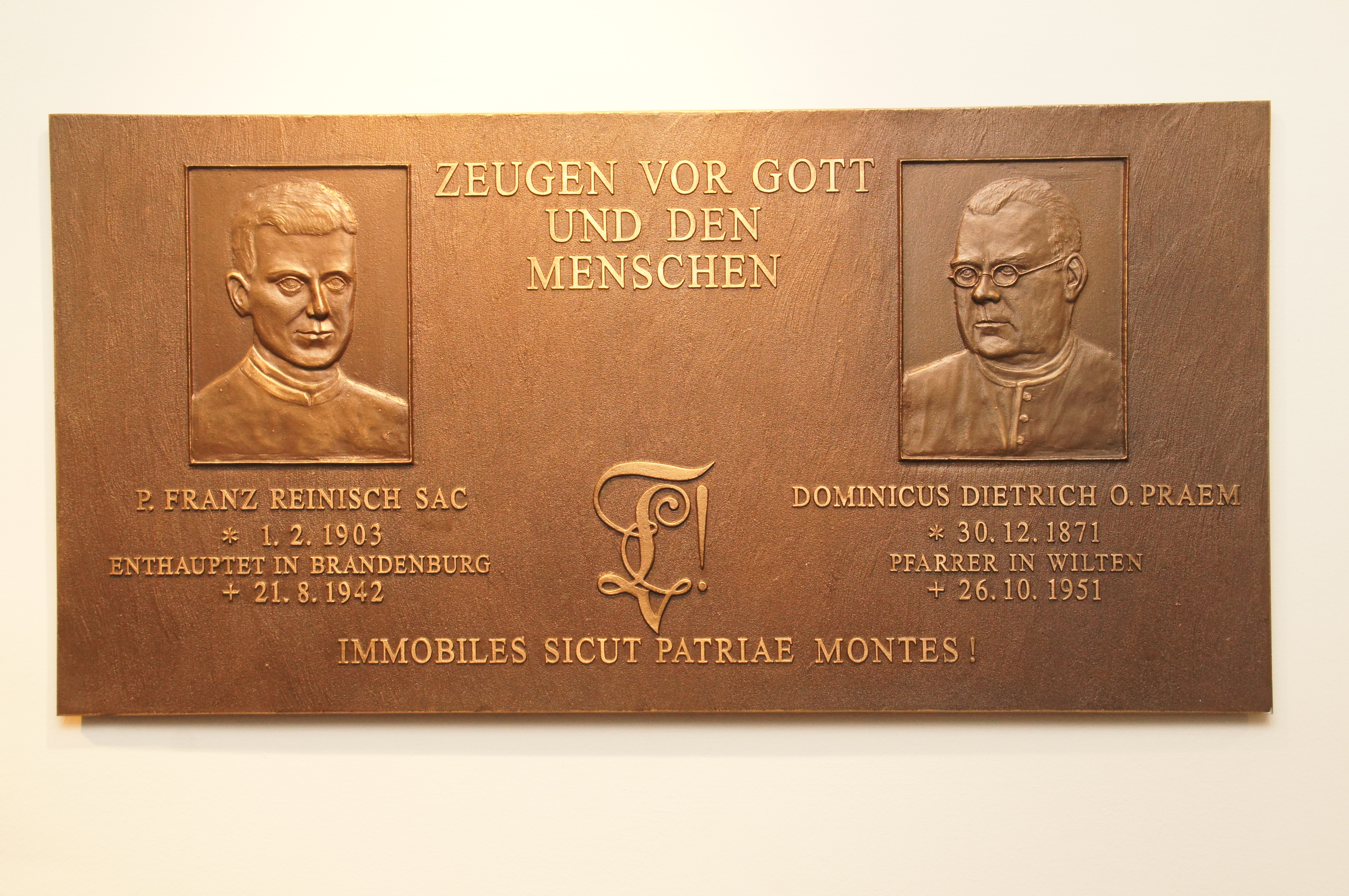 Gedenktafel für Pater Franz Reinisch und Dominikus Dietrich am Haus der KÖHV Leopoldina